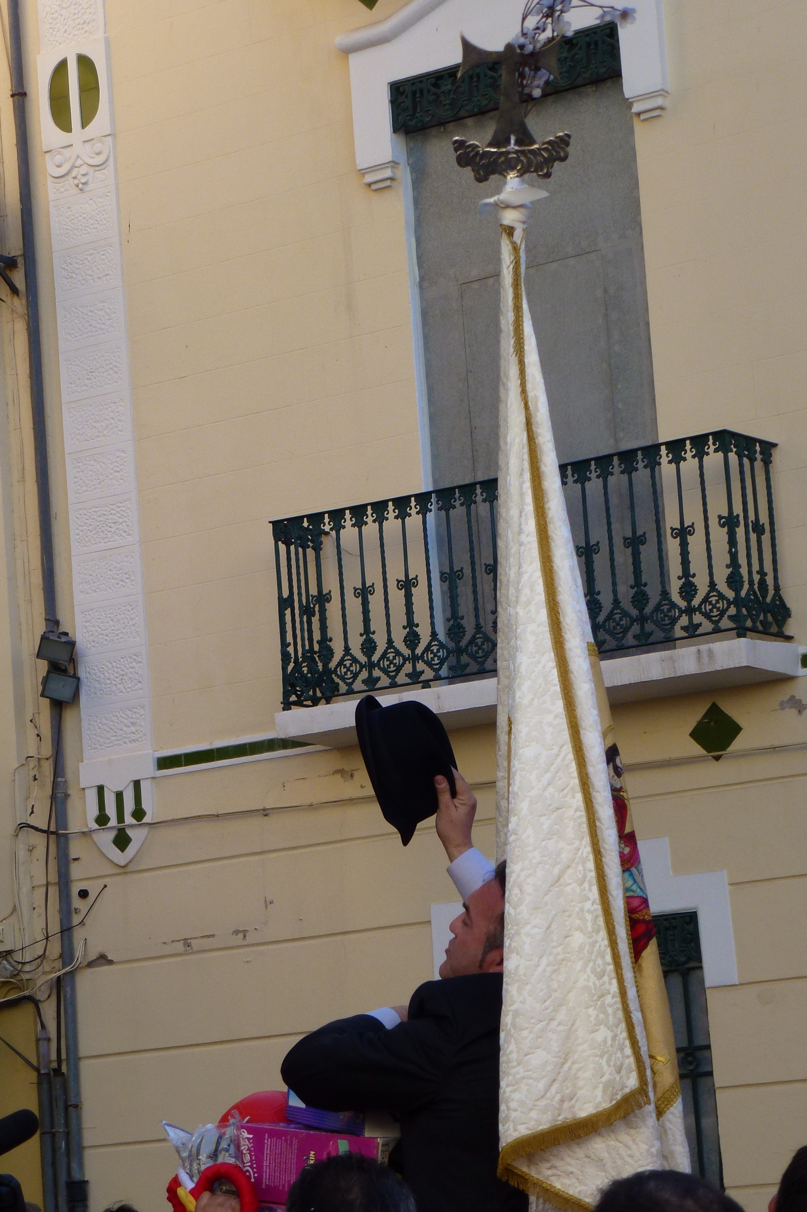 Comienza el recorrido dels Parells por todas las puertas del pueblo